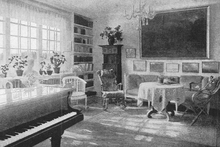 Villa Richard Bergh interiör 1906